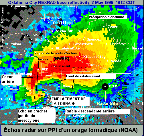 Échos radar de la tornade d'Oklahoma City le 3 may 1999 montrant les différents items caractéristiques d'une supercellule tornadique. à ce moment la tornade traversait l'autoroute 44 près de la rivière Canadian après avoir produit des dommages de F5 à Bridge Creek et avant de faire de même à Moore. Le rouge vif de l'emplacement de la tornade ne vient pas de la précipitation (pluie/grêle) mais du retour radar des débris (pièces d'autos, planches, arbres, etc.)